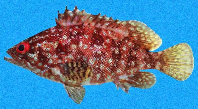 Alphestes immaculatus